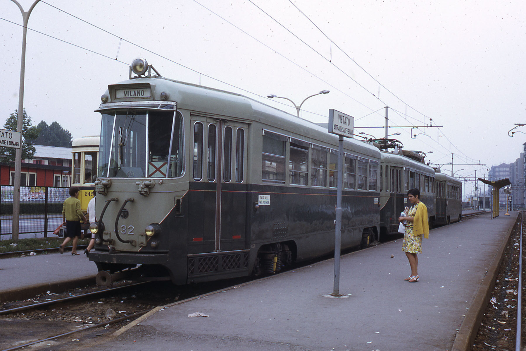 Treno bloccato serie 400 dell'ATM di Milano, in sosta alla stazione di Sire Raul, capolinea della "linea celere" Milano-Gorgonzola, e della tranvia extraurbana Milano-Vimercate